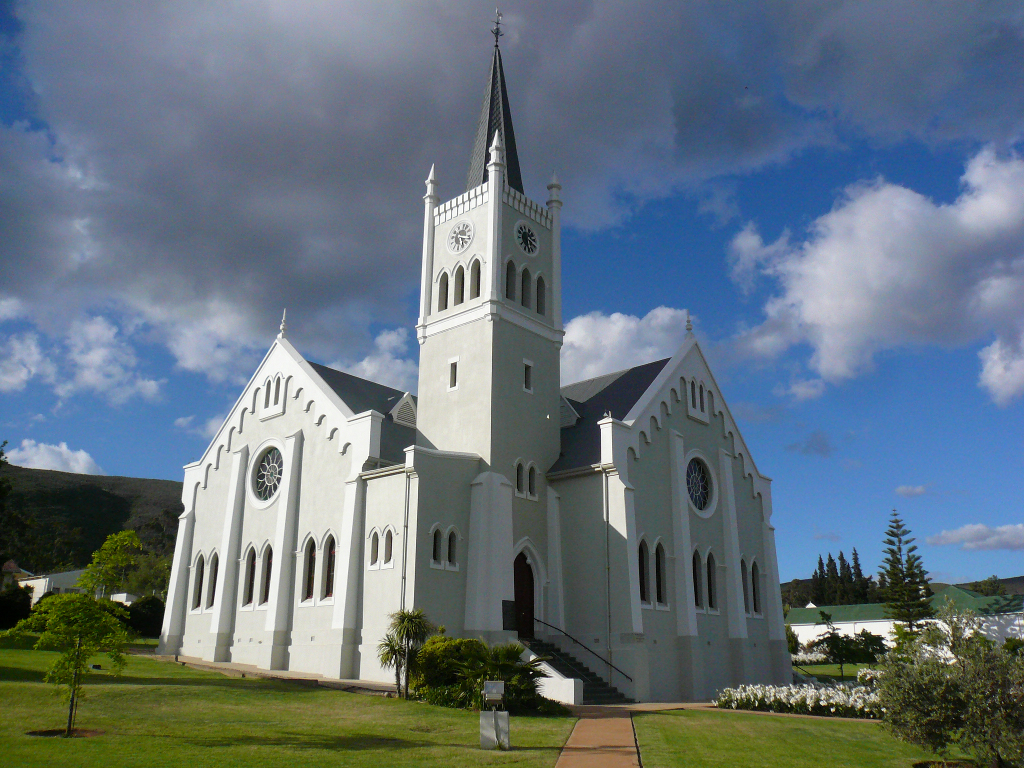 Niederländisch Reformierte Kirche, Barrydale, Westkap